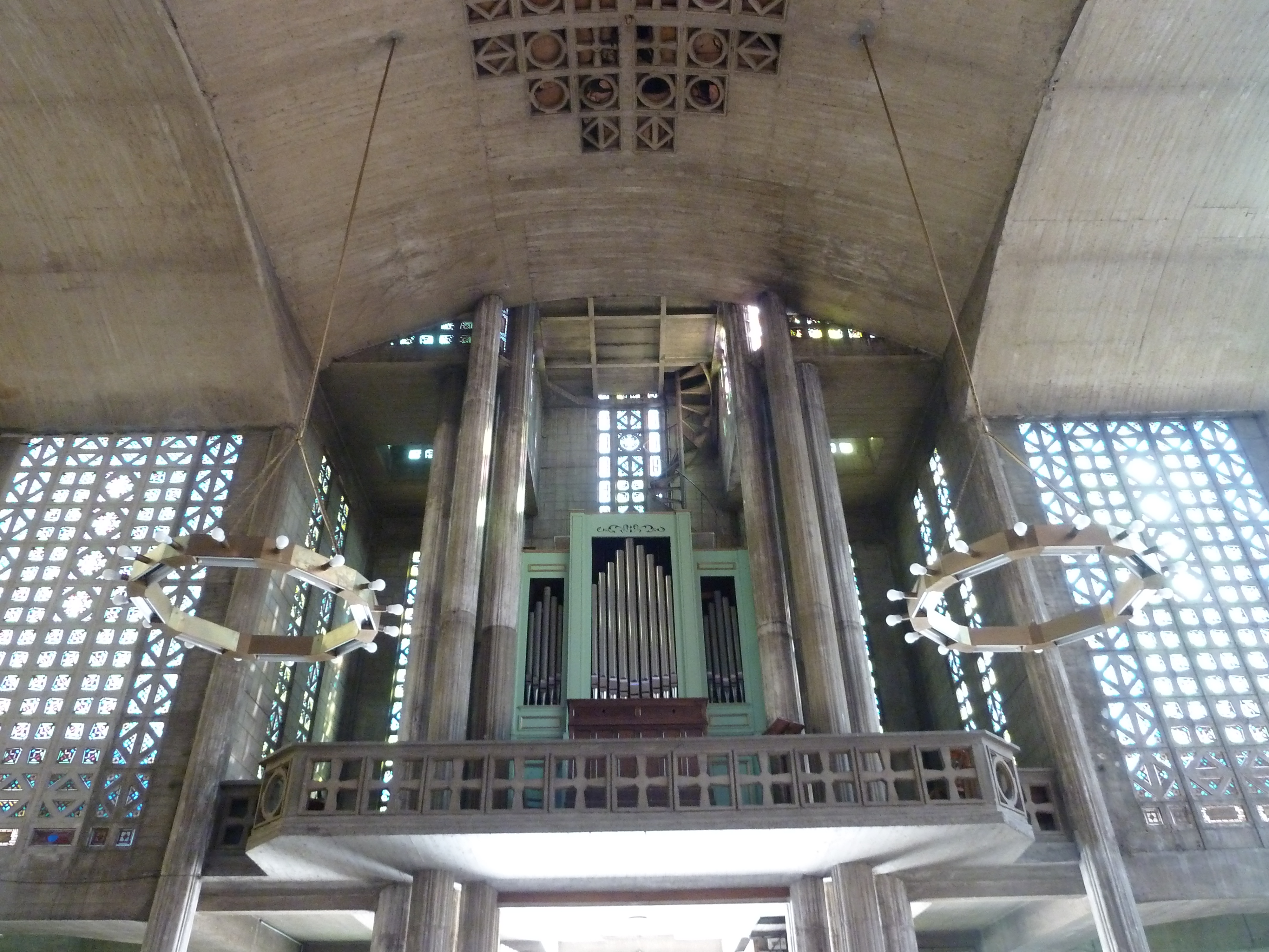 Église Notre-Dame du Raincy - Le Raincy - Seine-Saint-Denis - France - Mérimée PA00079948 .